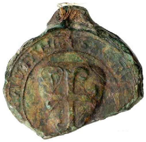 cf le titre.